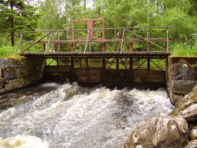 Nokoorin säännöstelypato